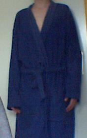 Eigen foto van eigen badjas om eigen bast. Flying DutchJan 20 mei 2006 16:15 (CEST)